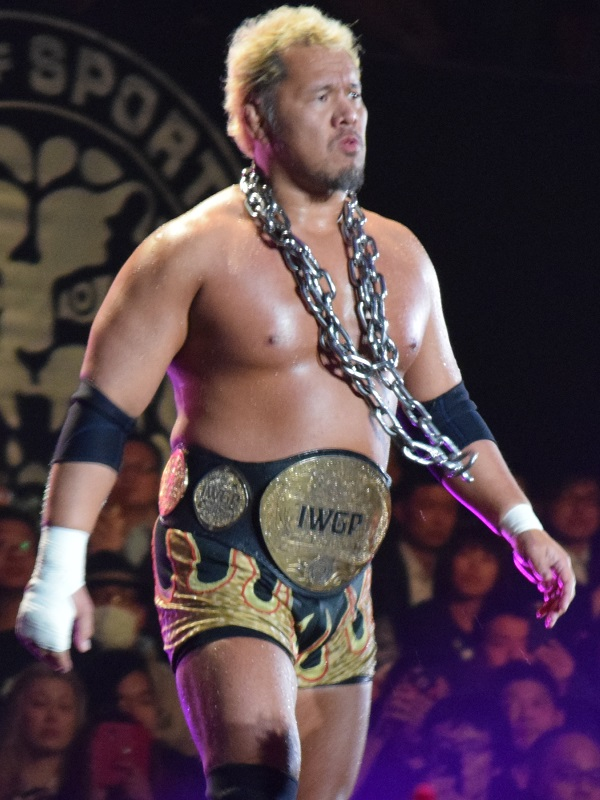 2016年2月11日 大阪府立体育会館 「THE NEW BEGINNING in OSAKA」 真壁刀義